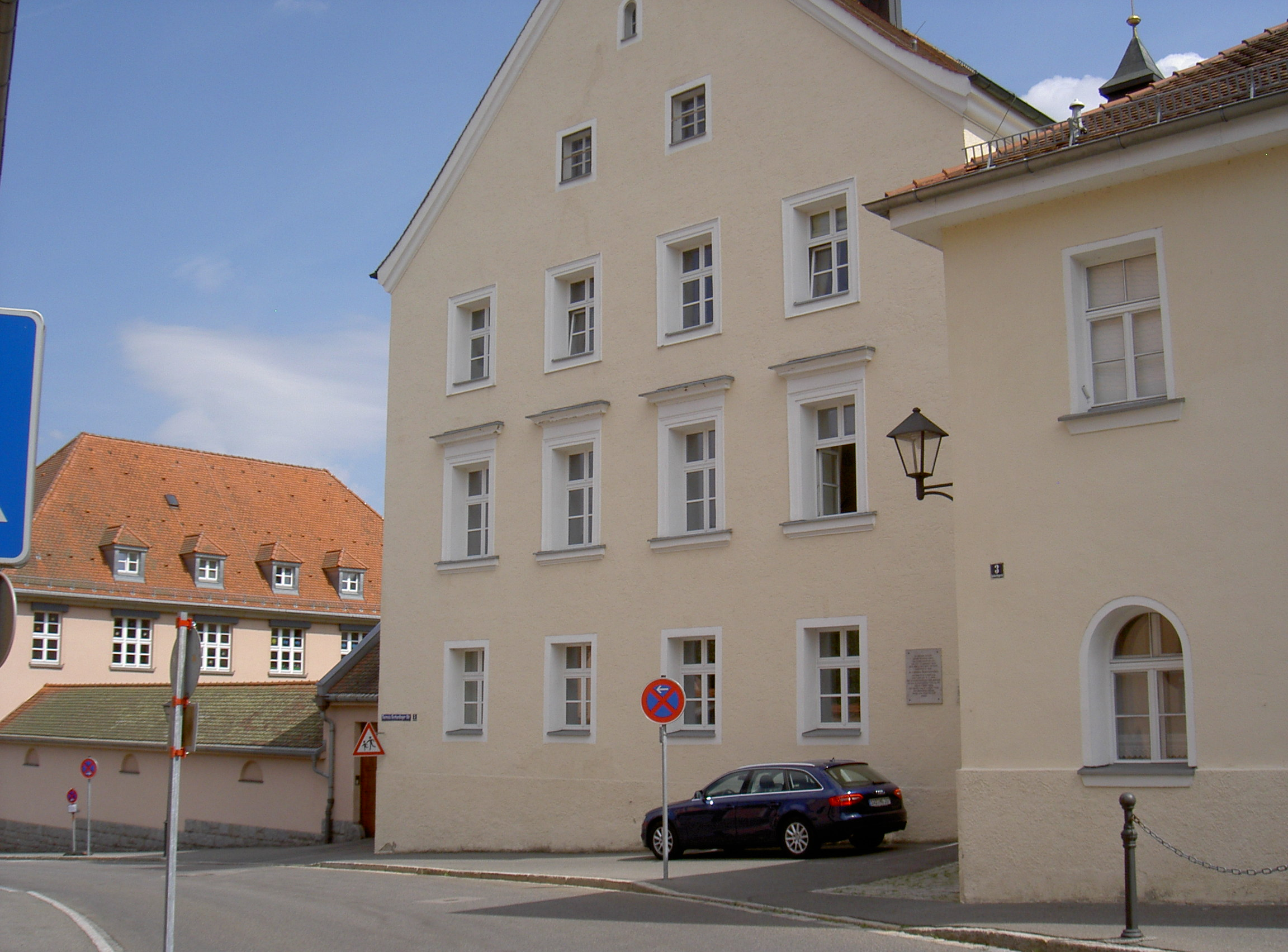 Neunburg vorm Wald, Gerhardingerstraße 5